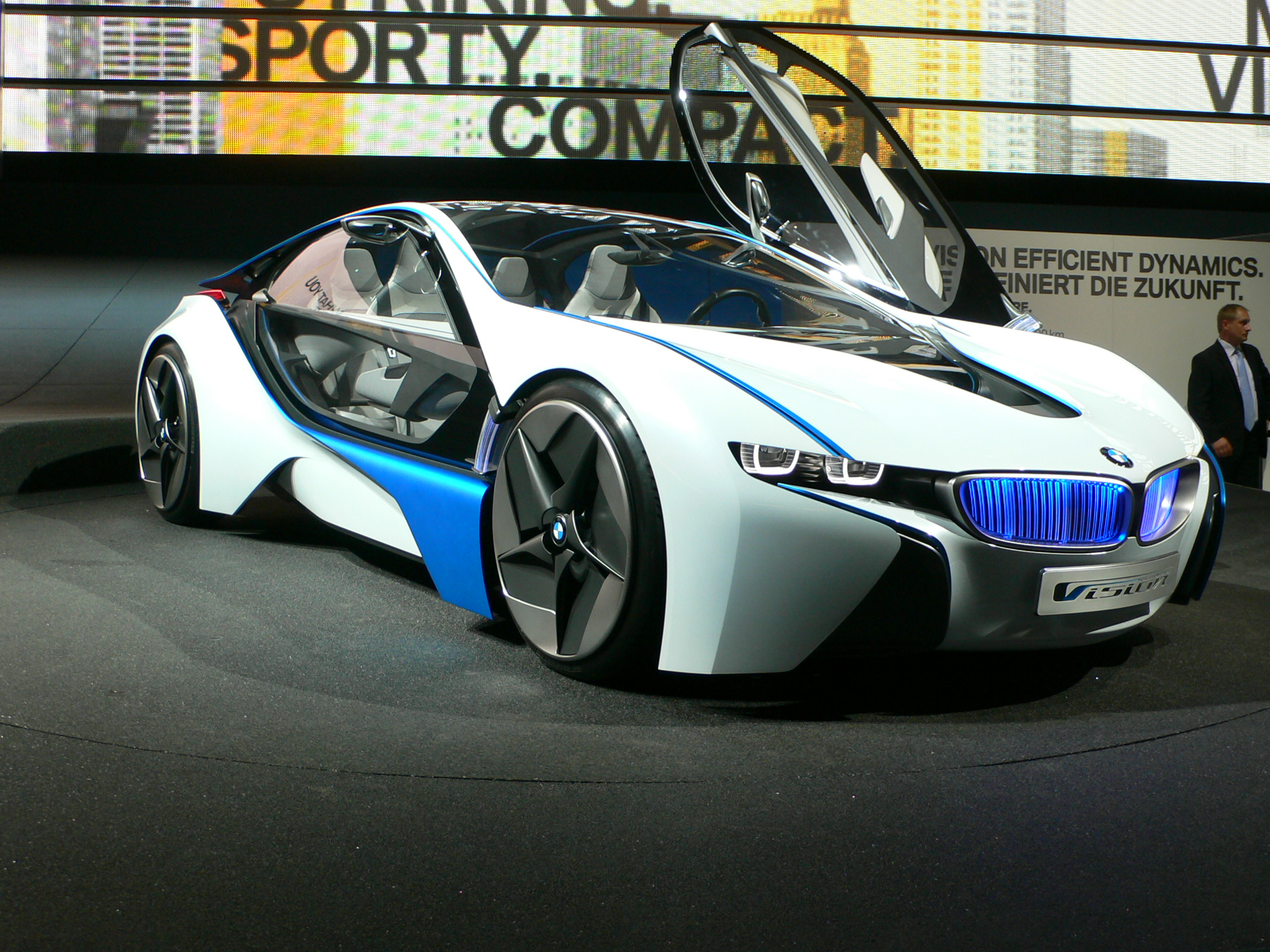 BMW Vision Dynamics au Salon de Francfort 2009